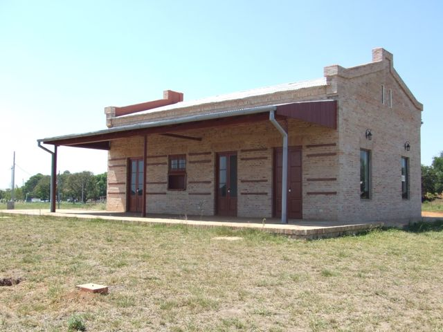 Estación de tren de Carmen del Paraná, Departamento de Itapúa, Paraguay. Recuperada y convertida en museo.